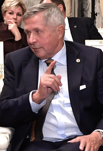 Космонавт Виктор Савиных во время встречи Президента России Владимира Путина со съёмочной группой фильма «Салют-7».